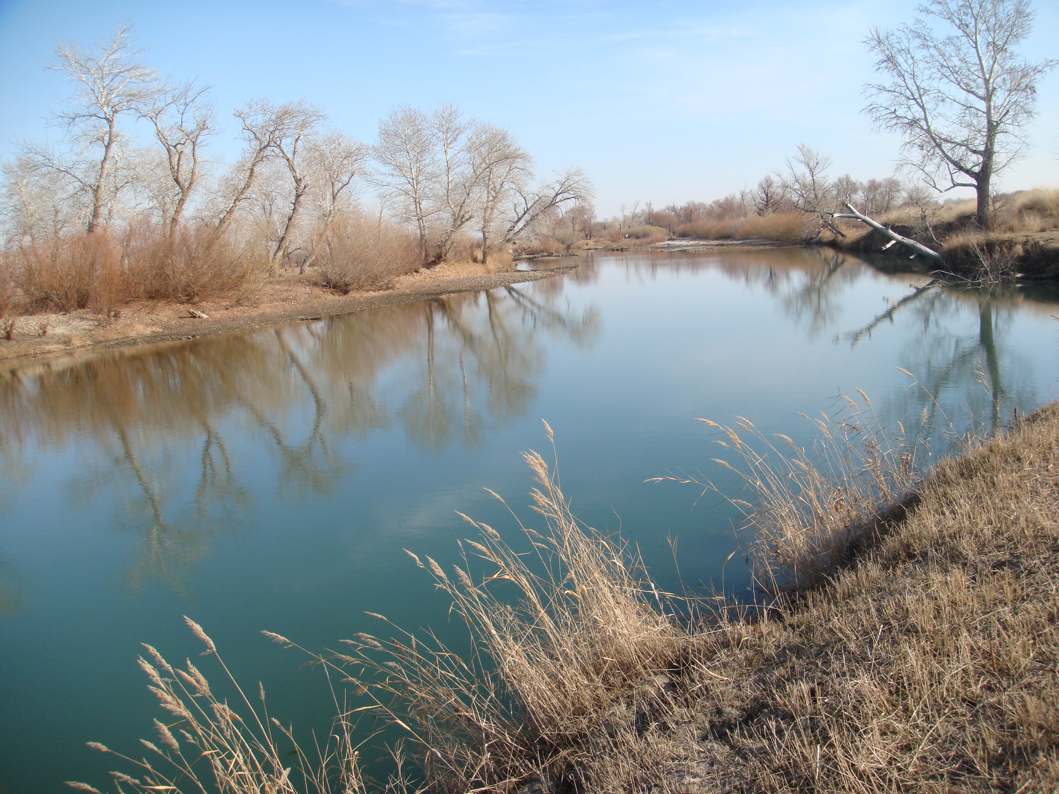 克兰河秋景 余华峰